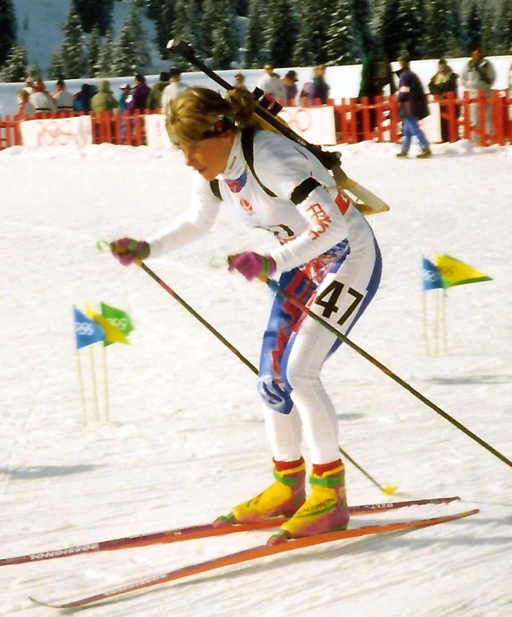 Anne Briand lors du 15 km dames des J.O. d'Alberville, le 19 février 1992.